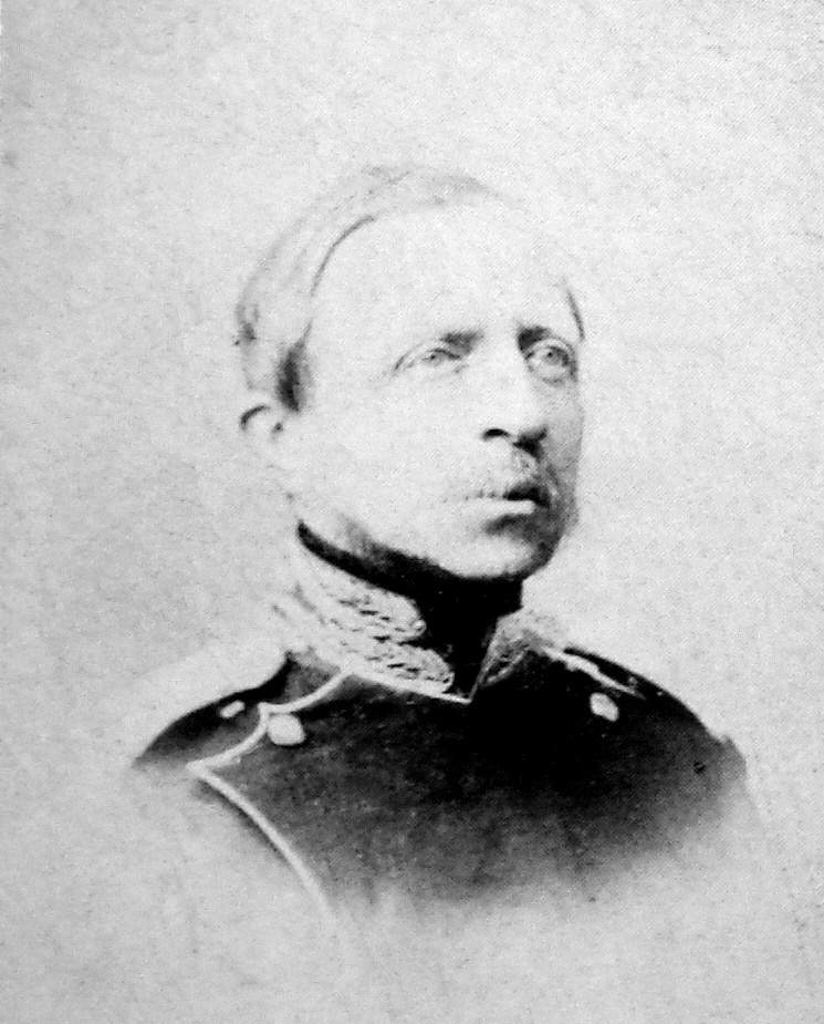 Duke Peter of Oldenburg (1812-1881)